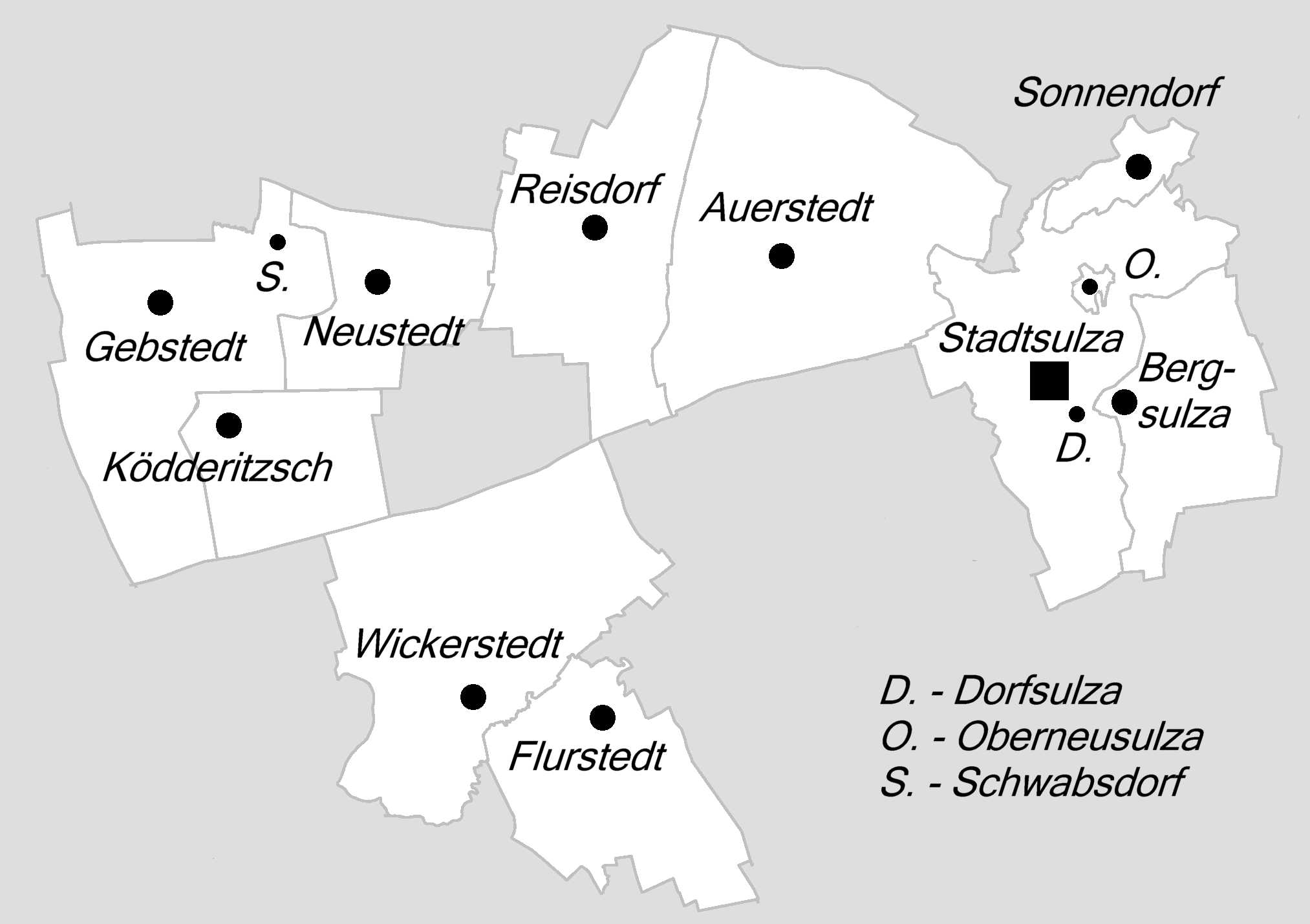 Bad Sulza, Gemeindegliederung